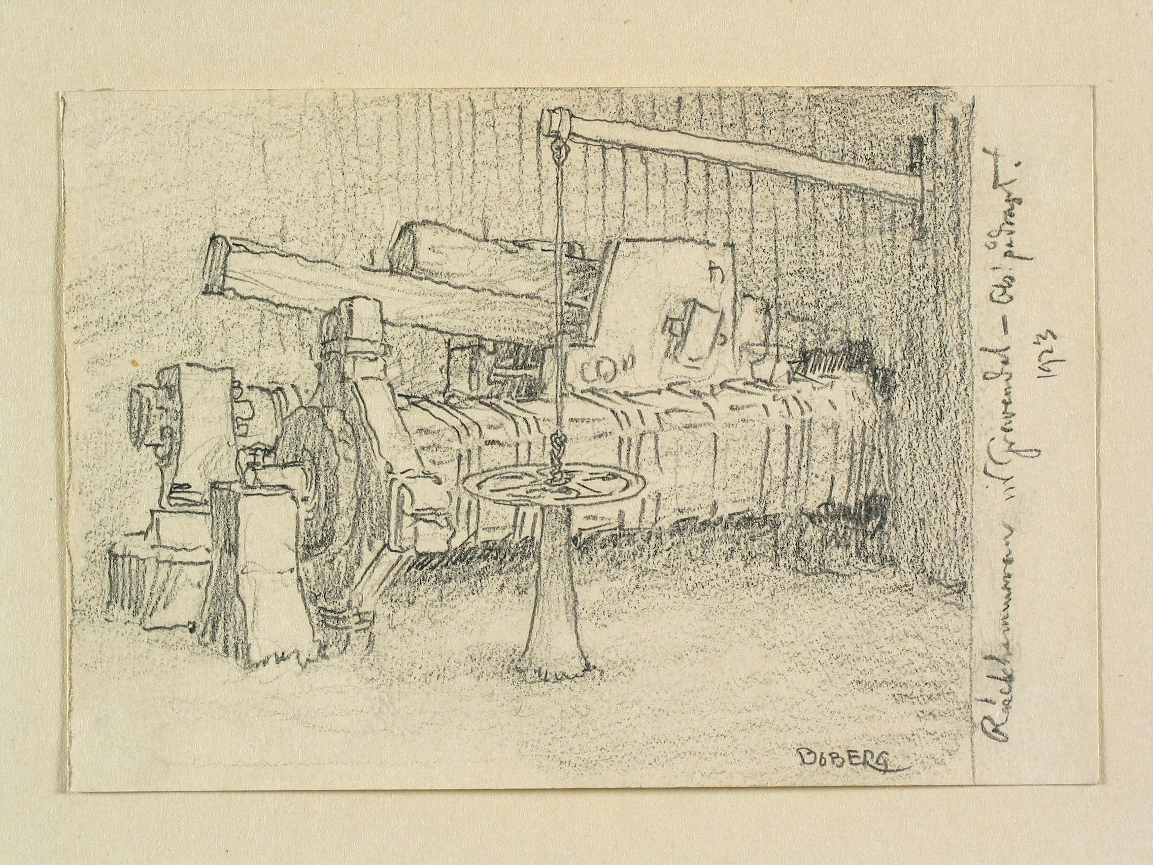 Dalarna, Säfsnäs sn., Gravendal. Räckhammare. Teckning av Ferdinand Boberg Depicted place: Säfsnäs sn., Gravendal (Ortnamn därutöver), Dalarna County (Q103732)